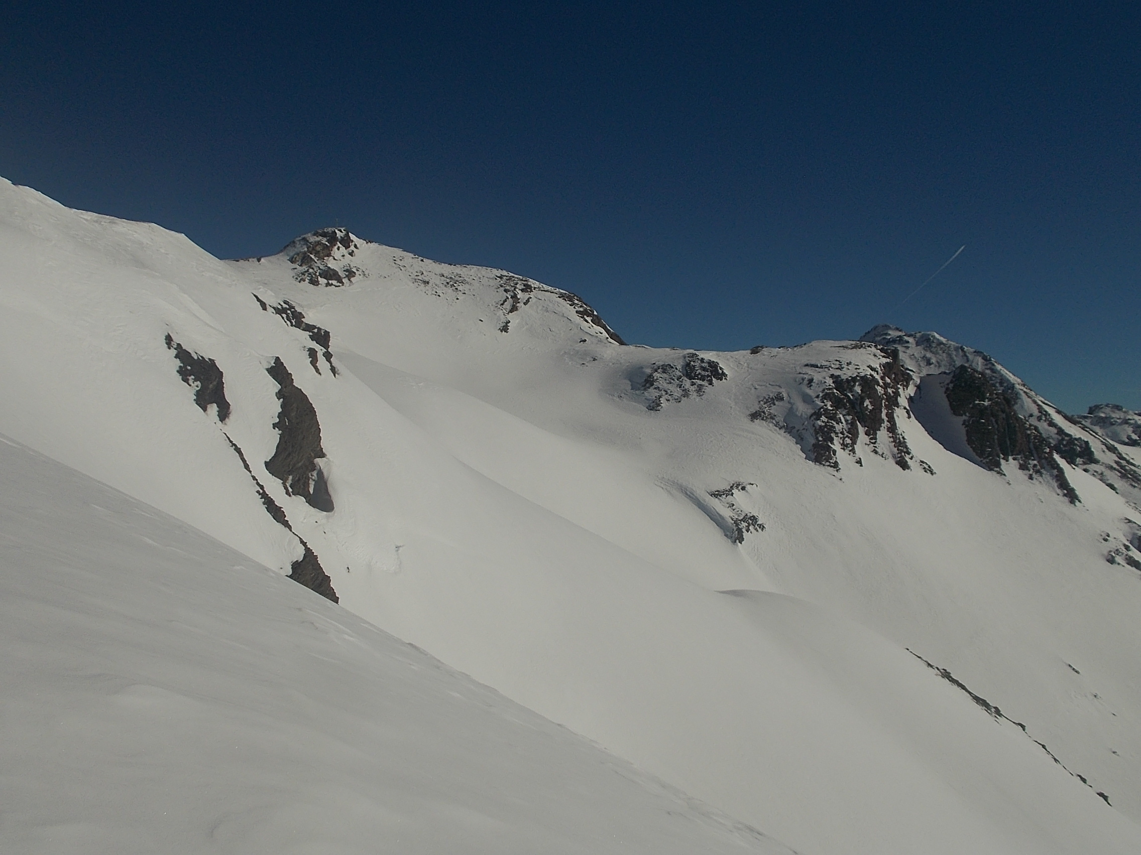 Skitour vom Futschölpaß zum Grenzeckkopf (hinten, mit Gipfelkreuz). Rechts hinten (am Ende des Kondensstreifens) der Piz Tasna (3179 m).